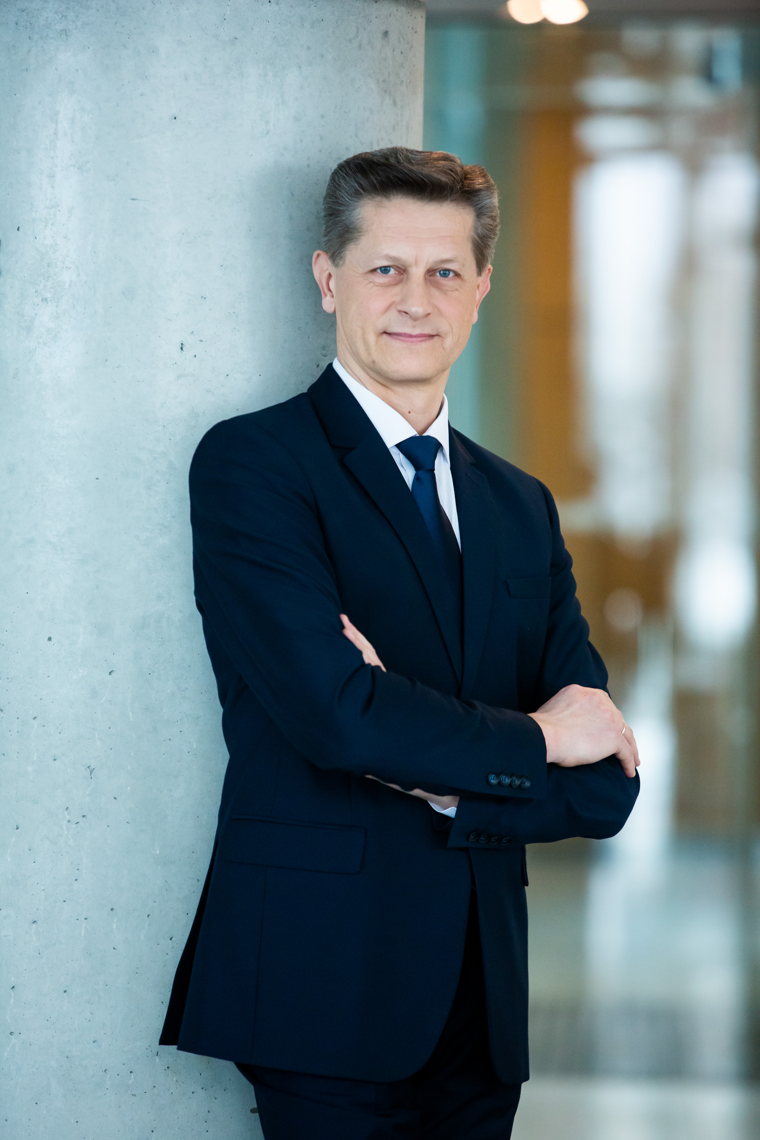 Dainius Puišys